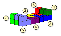 Egen teckning